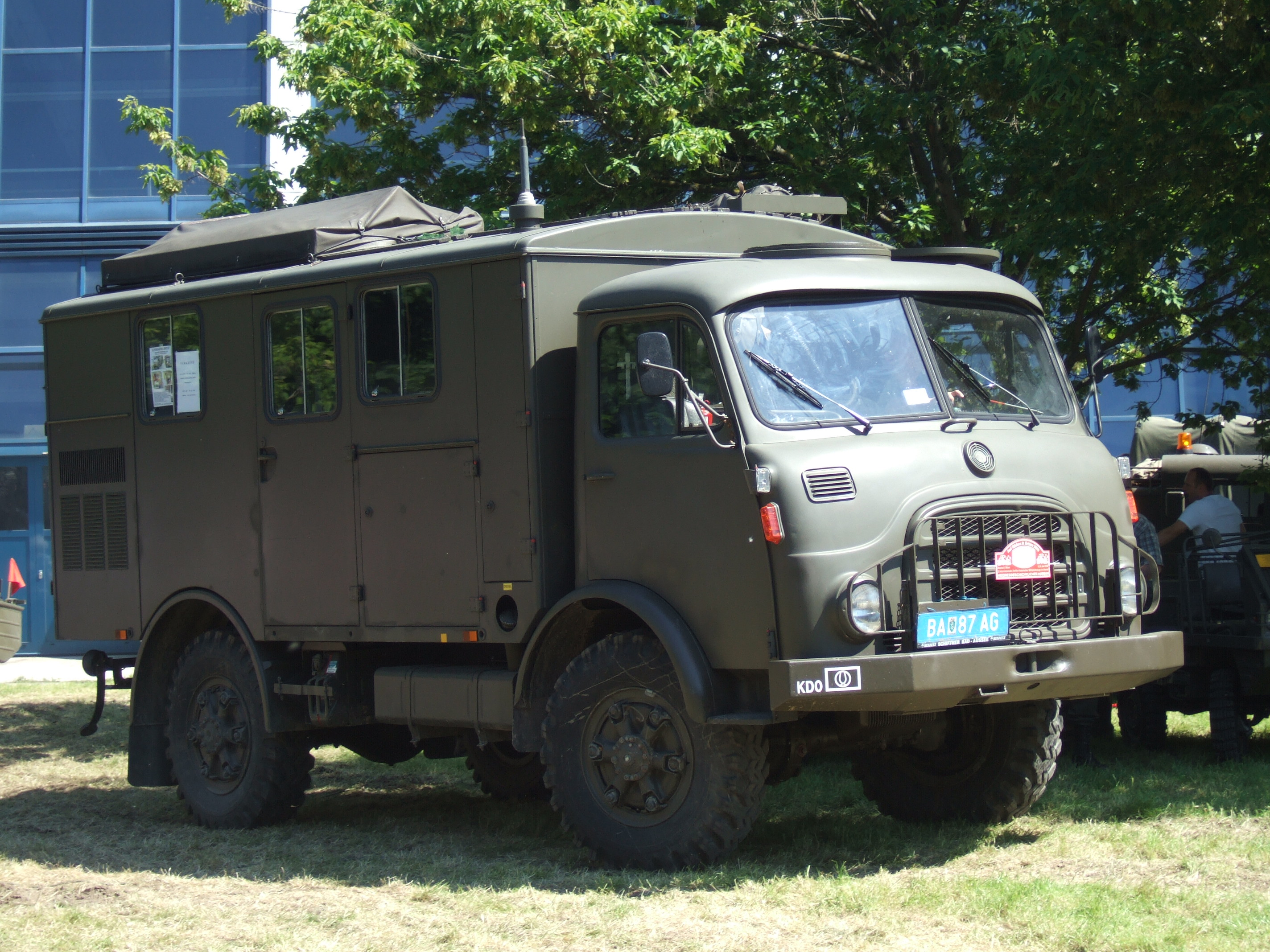 Steyr 680M bei einer Vorführung der Veranstaltung "Auf Rädern und Ketten" im Heeresgeschichtlichen Museum in Wien.